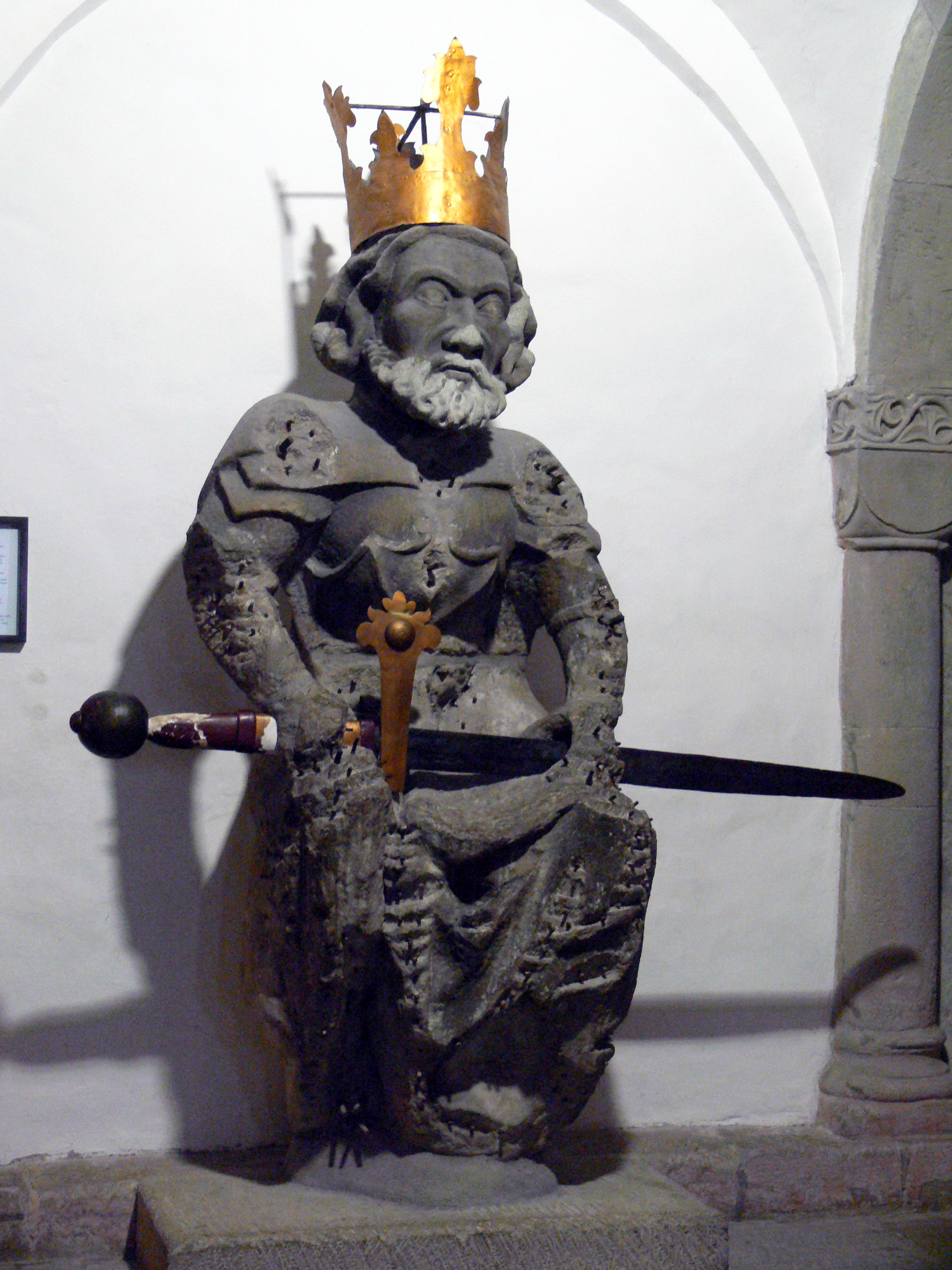 Zürich. Großmünster. Figur von Carolus Magnus in der Krypta.